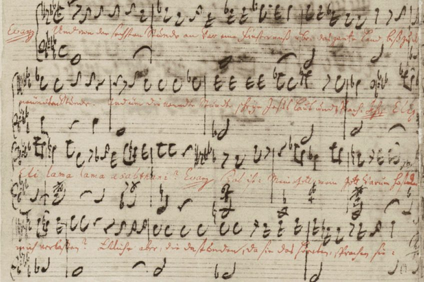 Matthäuspassion, Auszug aus der Partitur von 1736